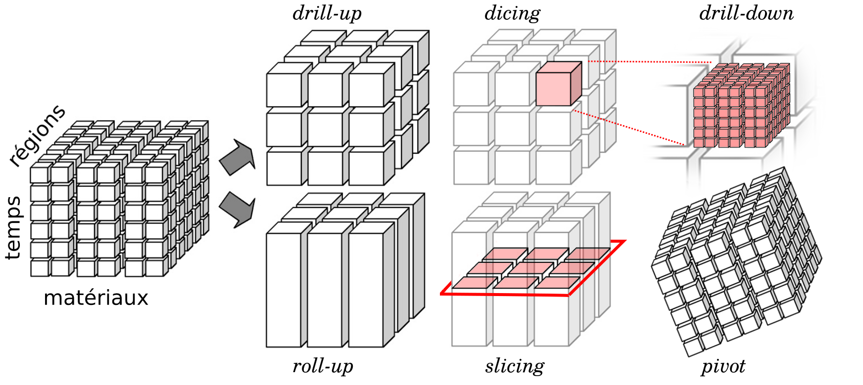 cube OLAP et opérations (drill-up, drill-down, dicing, roll-up, slicing, pivot)